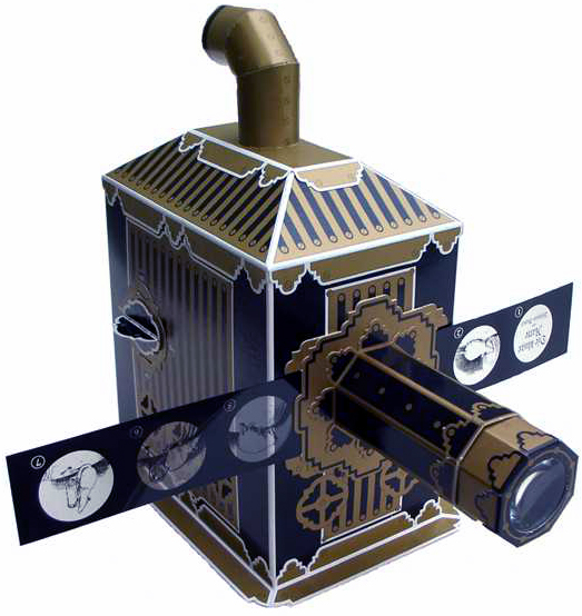 Obrazový projektor čarovná lampa (Magic Lantern)